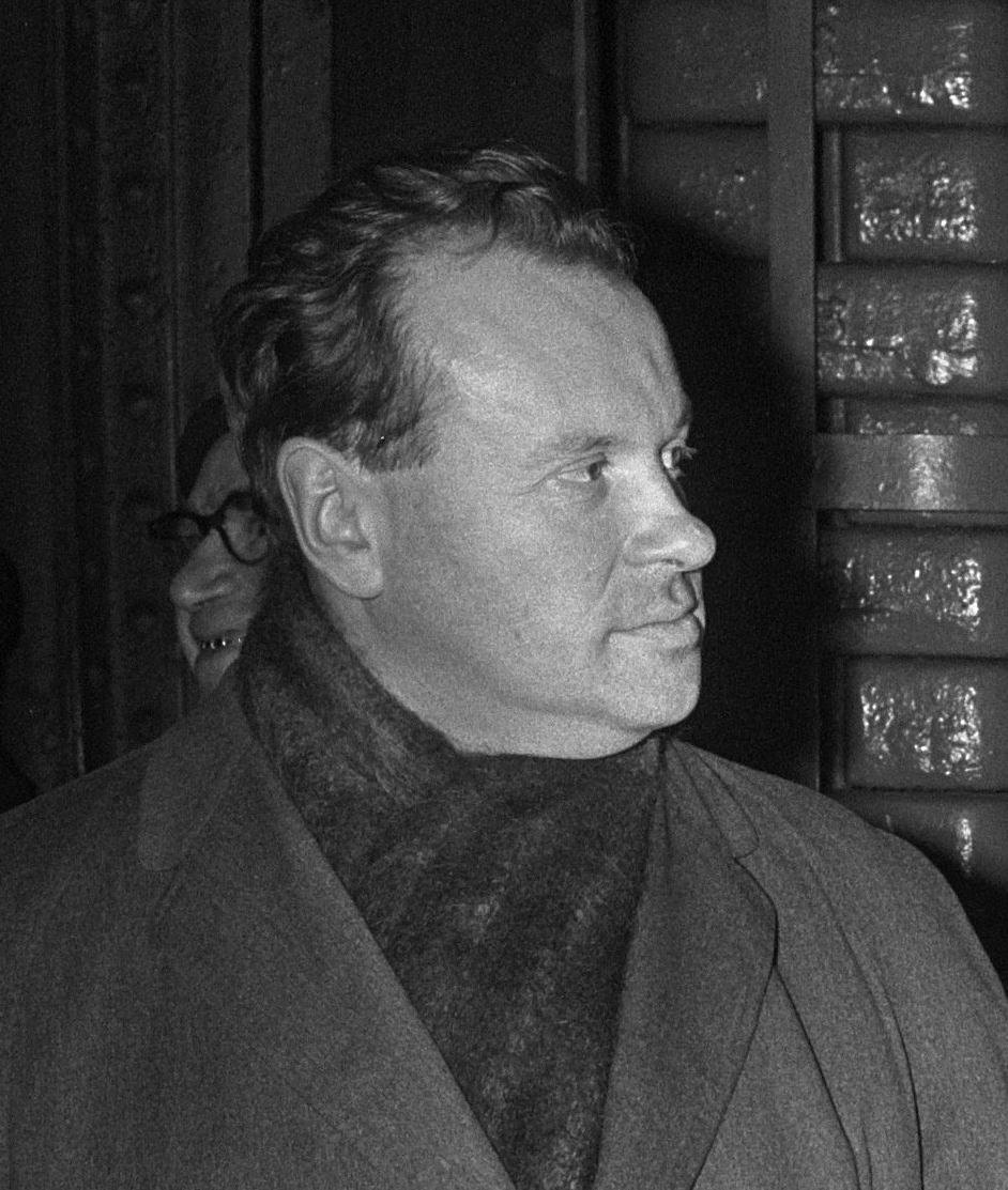 Aankomst Russisch Staatsorkest op CS Amsterdam. Yevgeny Svetlanov